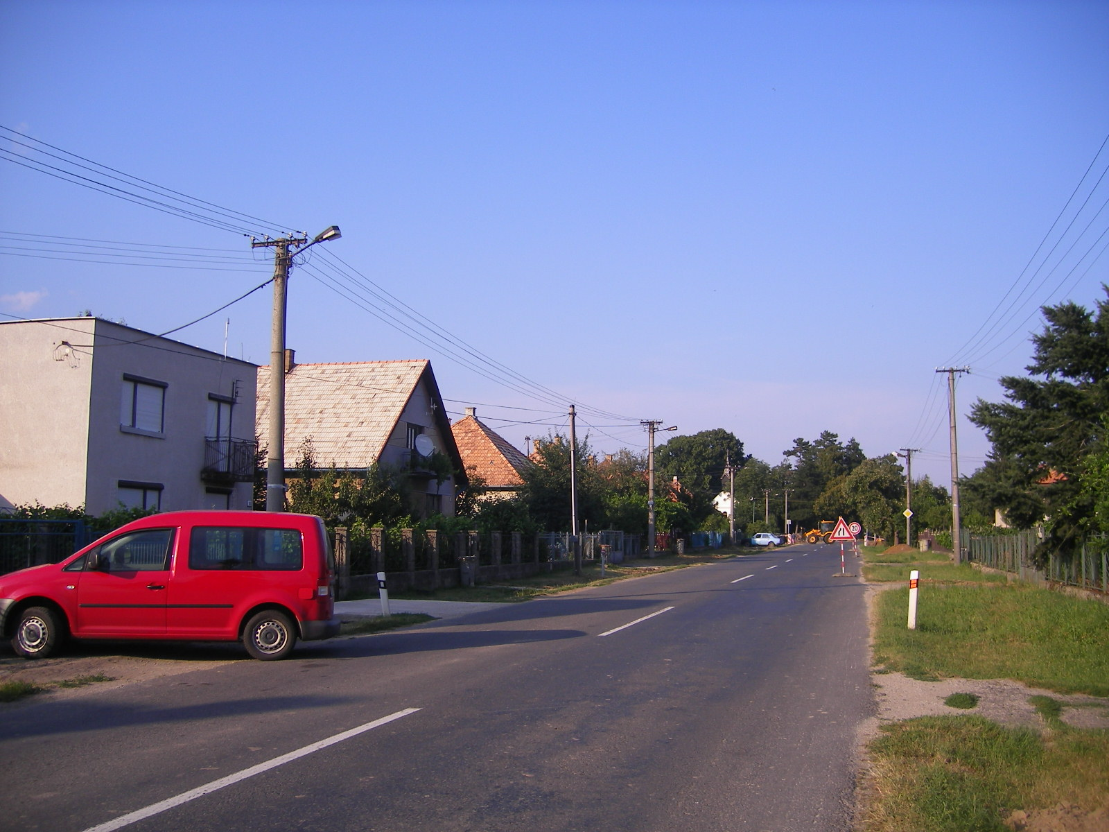 Kóvár - utcakép